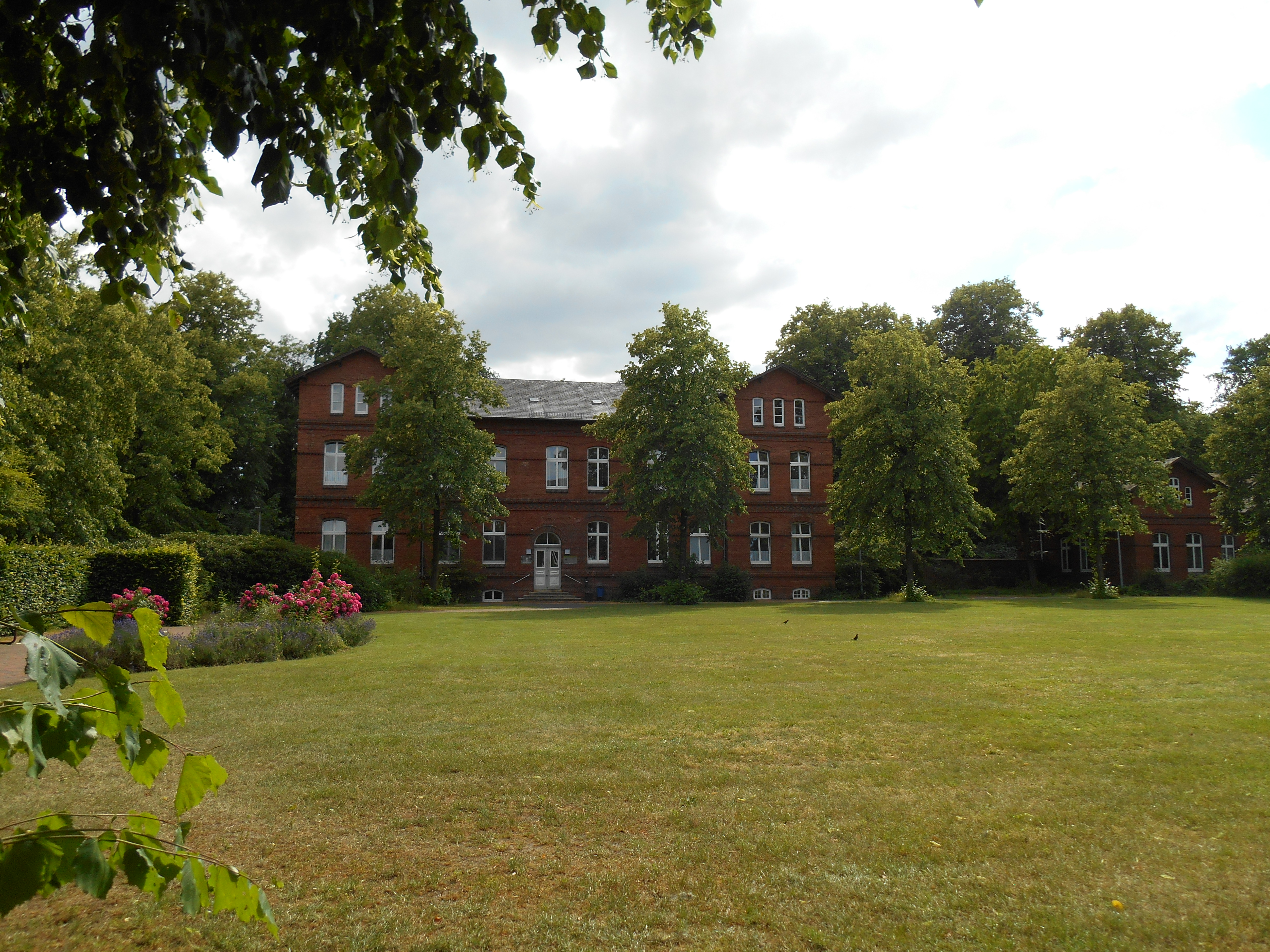 Бад Цвишенан, Психиатрическая клиника 1